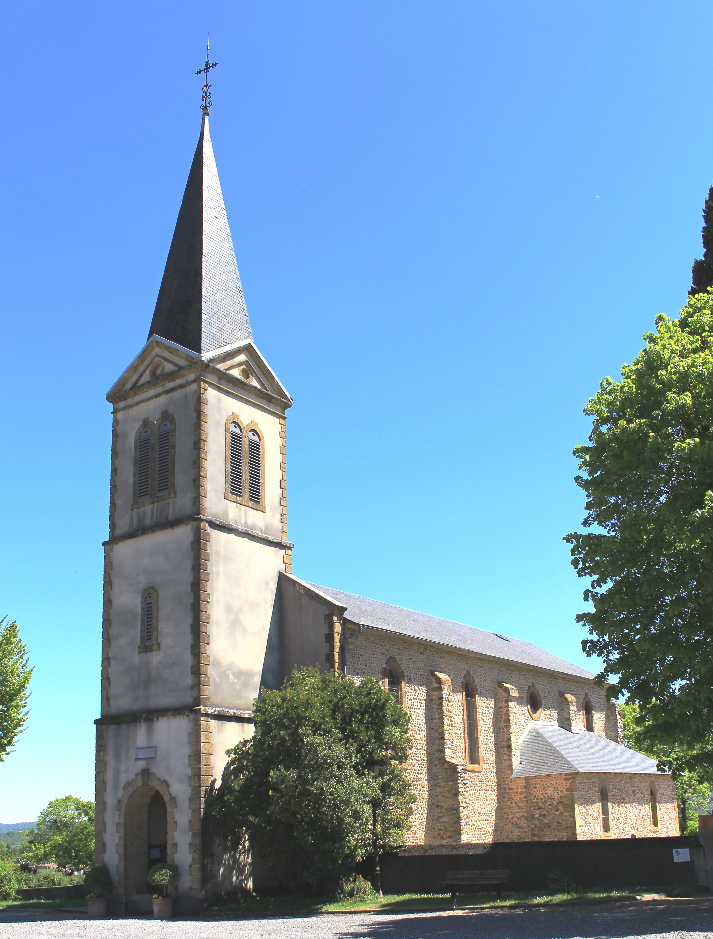 Église Saint-Ours de Sentous (Hautes-Pyrénées)